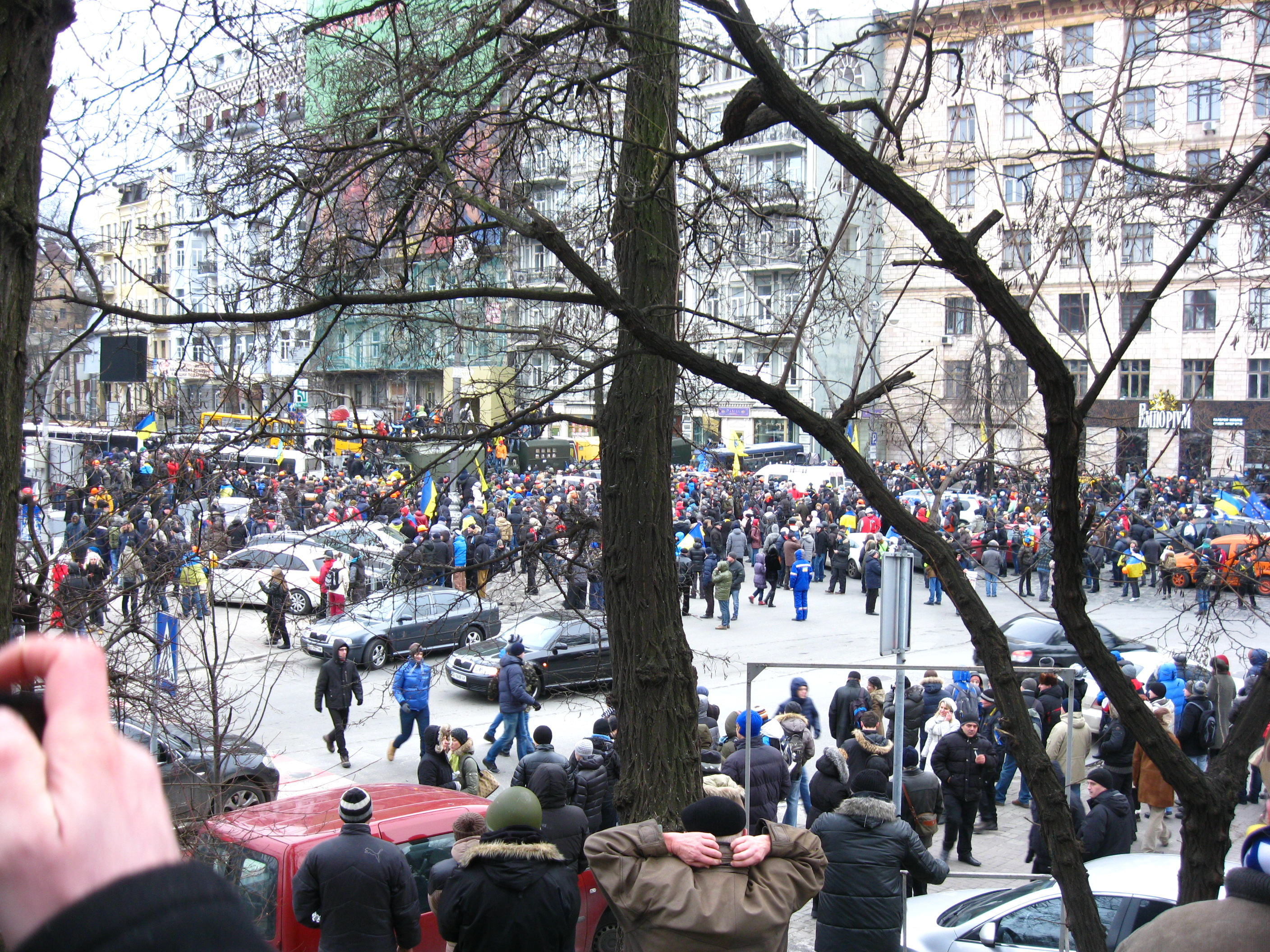 Євромайдан, кордон з міліцією на вул. Грушевського